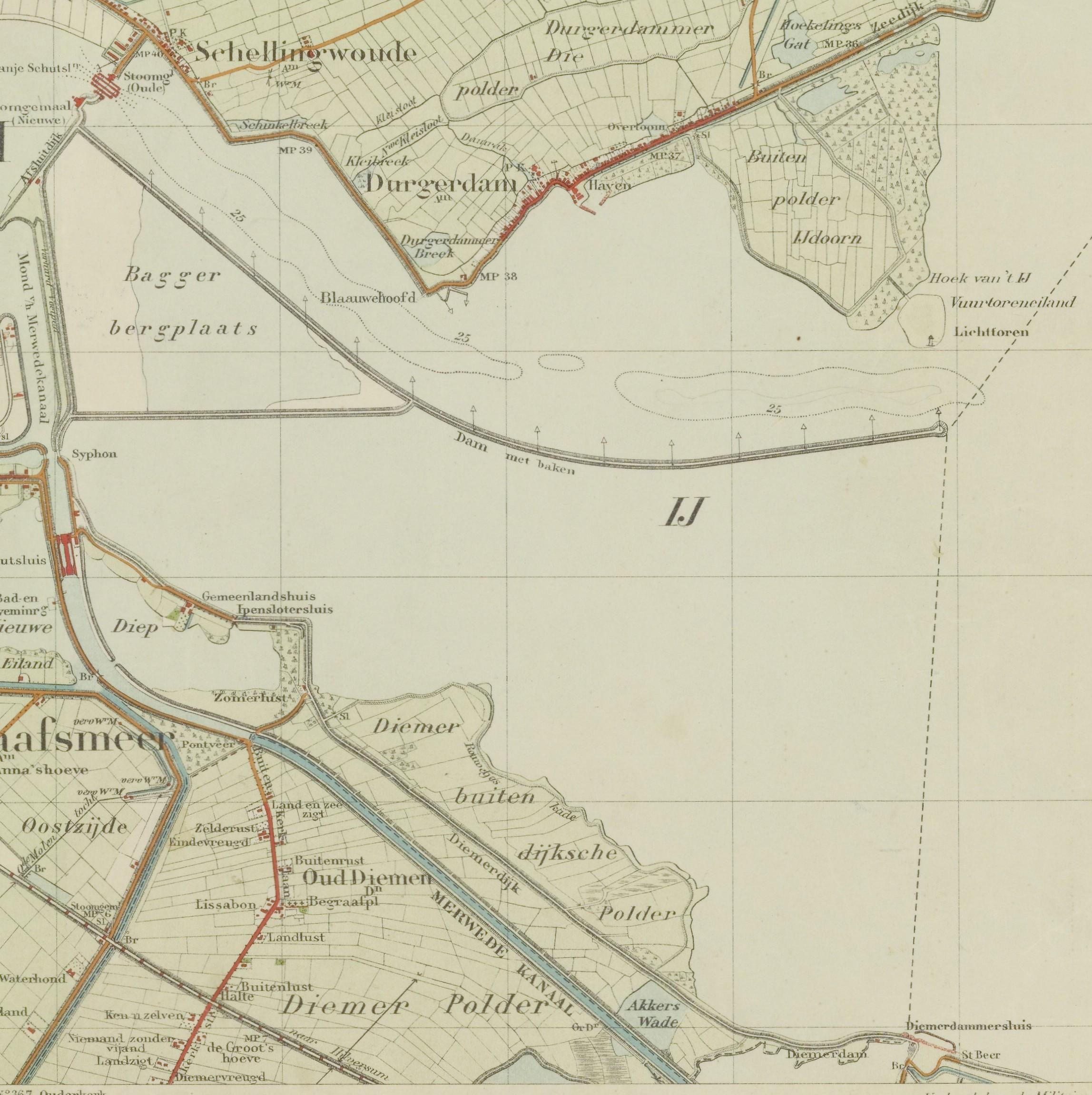 Kaartblad No.348, Amsterdam II. Verkend door de Militaire Verkenningen Schaal 1:25.000. Verkend in 1876. Herzien in 1892. Gedeeltelijk herzien tot 1916. Uitgave 1929. Druk: Topographische Inrichting. Druk in kleur.